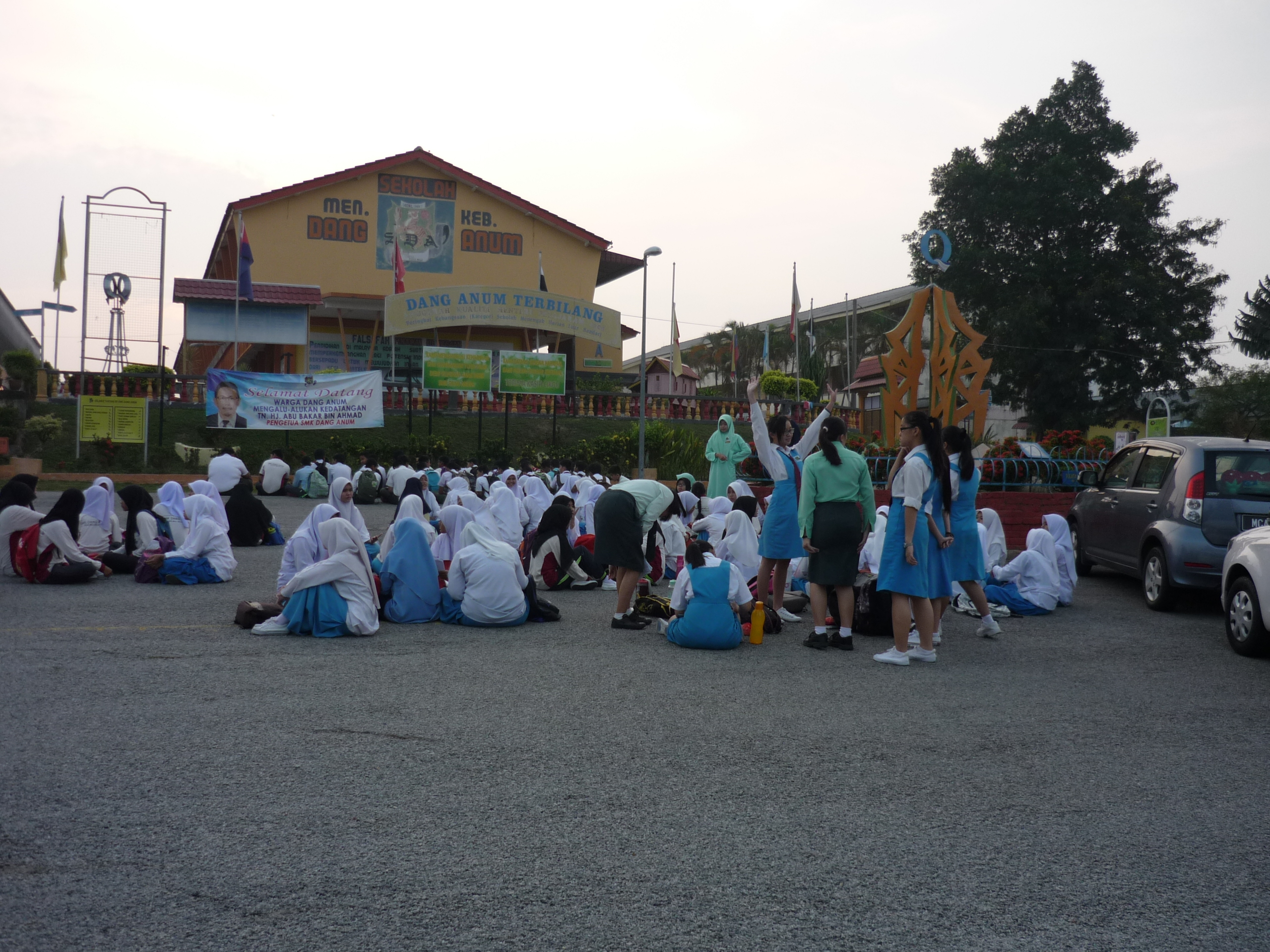 Dataran Perhimpunan SMKDA